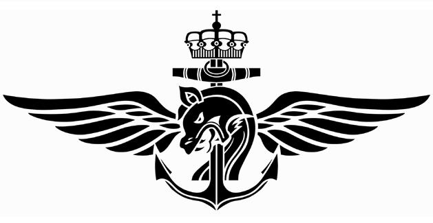 mjk logo